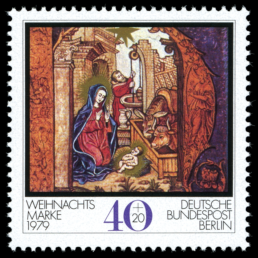 German stamp